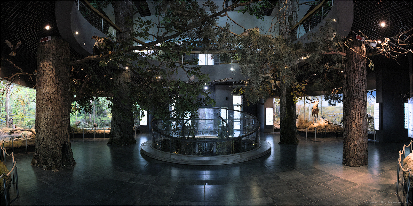 Музей природы в Лясковичах, Белоруссия.